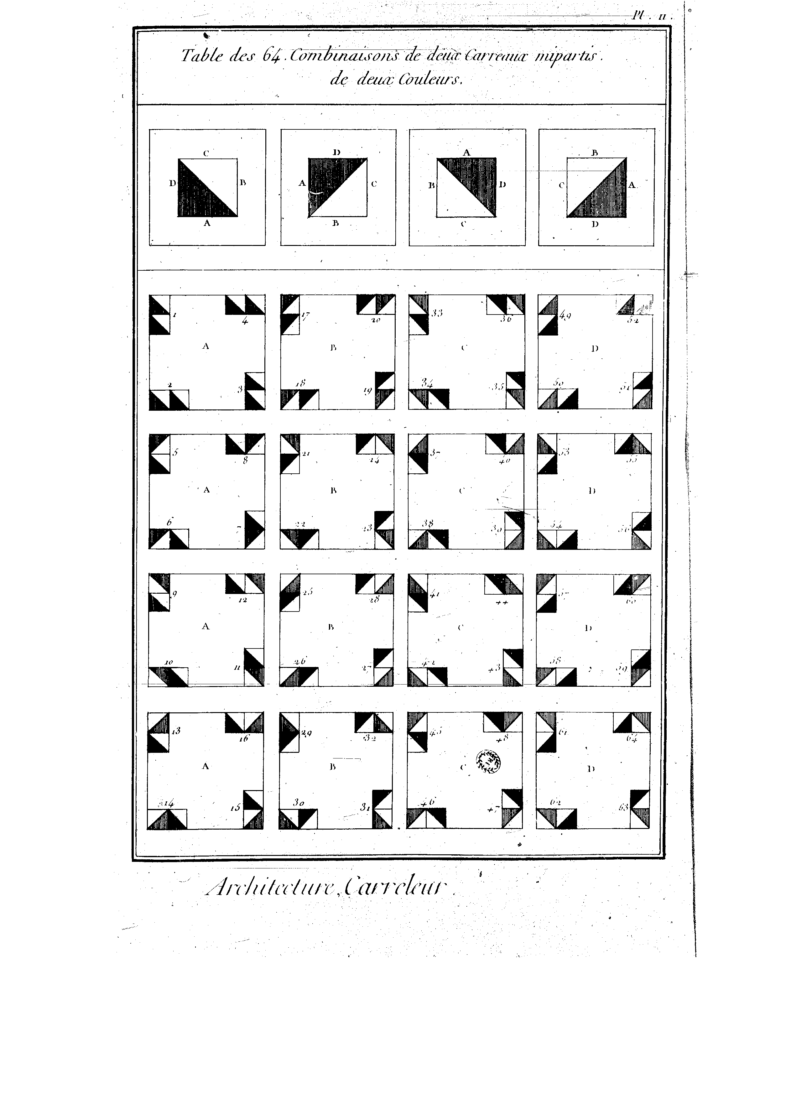 Planches de l'Encyclopédie de Diderot et d'Alembert, volume 1